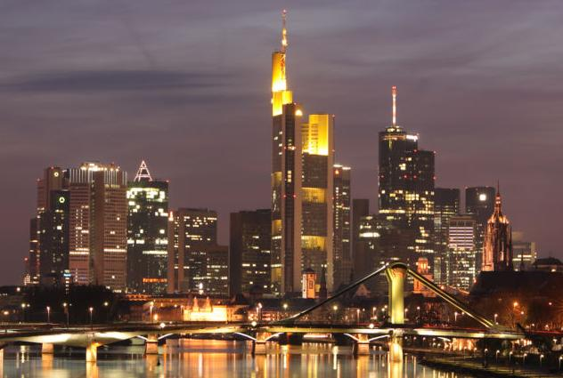 Skyline von Frankfurt am Main, aufgenommen von der Deutschherrnbrücke